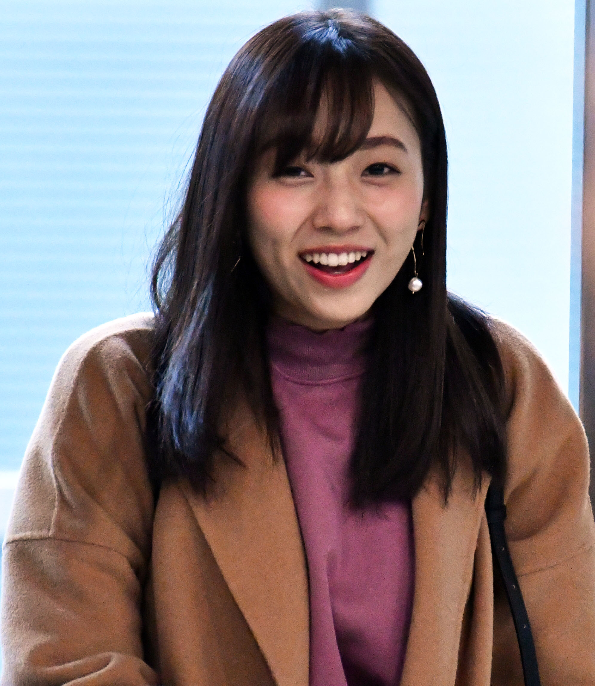 乃木坂46成員在台北國際松山機場。